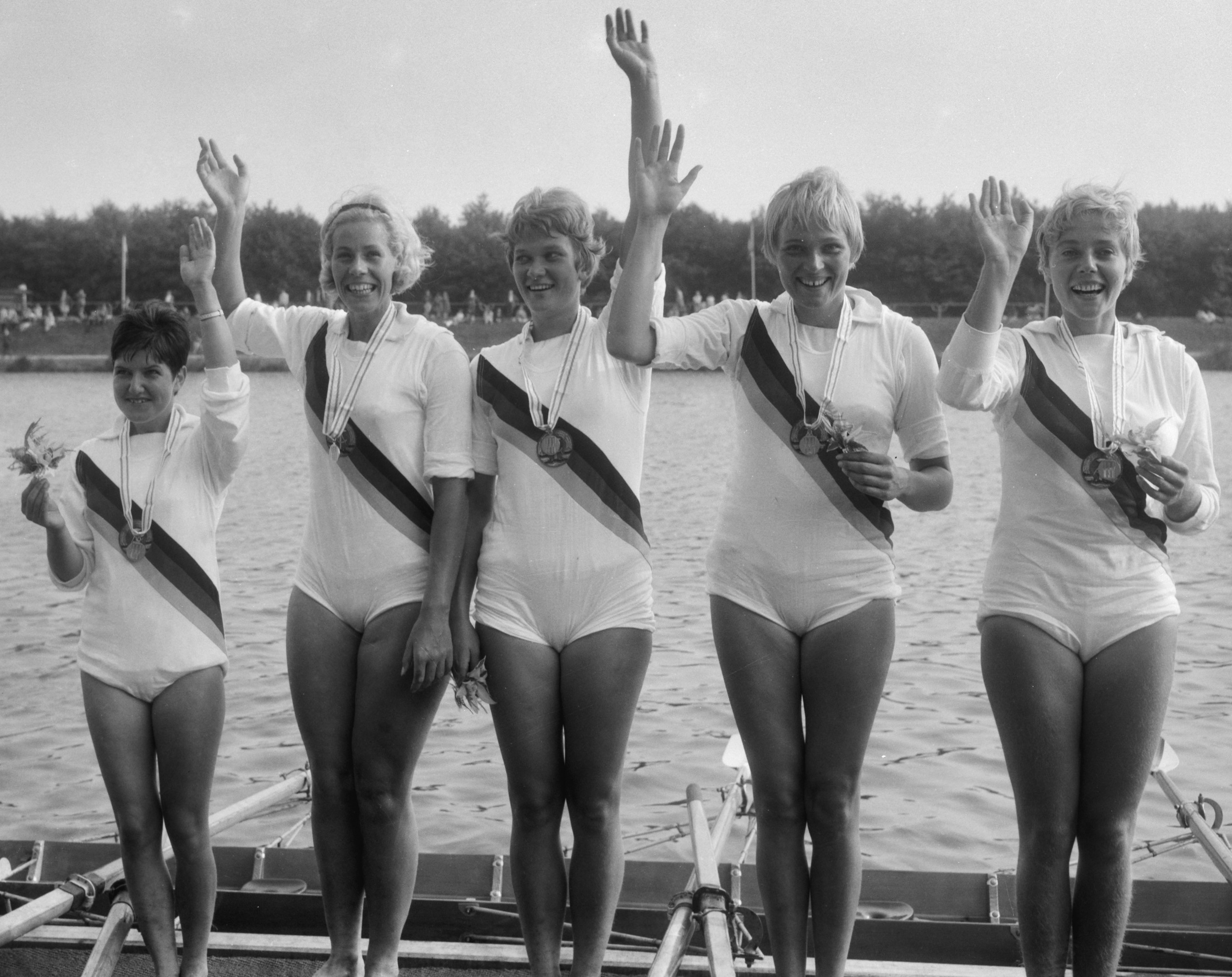 Europese Roeikampioenschappen dames 1966, Oost-Duitse dubbel-vier. ID